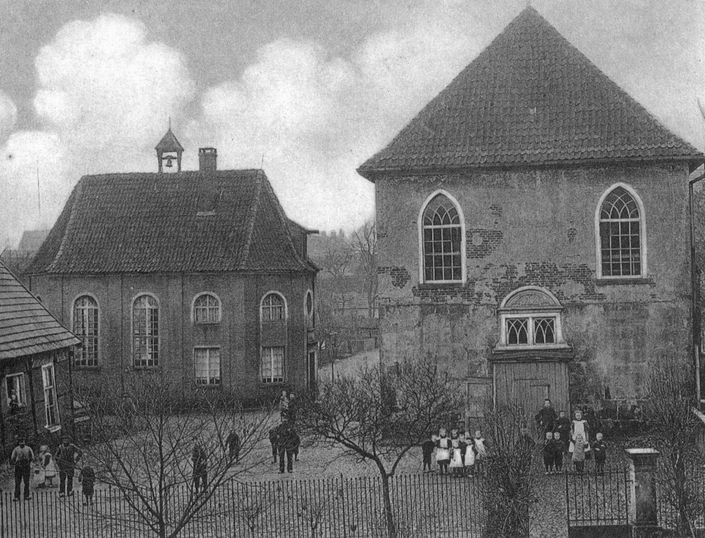 Nordhorn